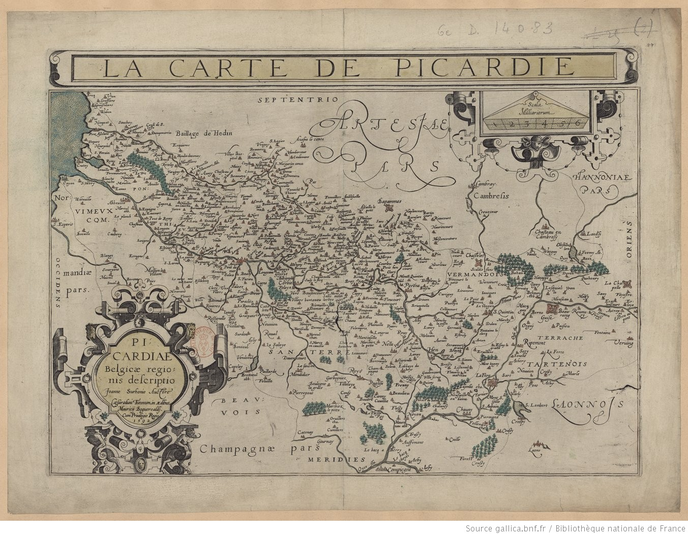 La carte de Picardie: Karte der Picardie, Kupferstich (1592), nach dem Original (1557) des Kartografen Jean Surhon von dem Verleger Maurice Bouguereau überarbeitet und 1594 in seinem Atlas Le Theatre Francoys in Tours veröffentlicht.